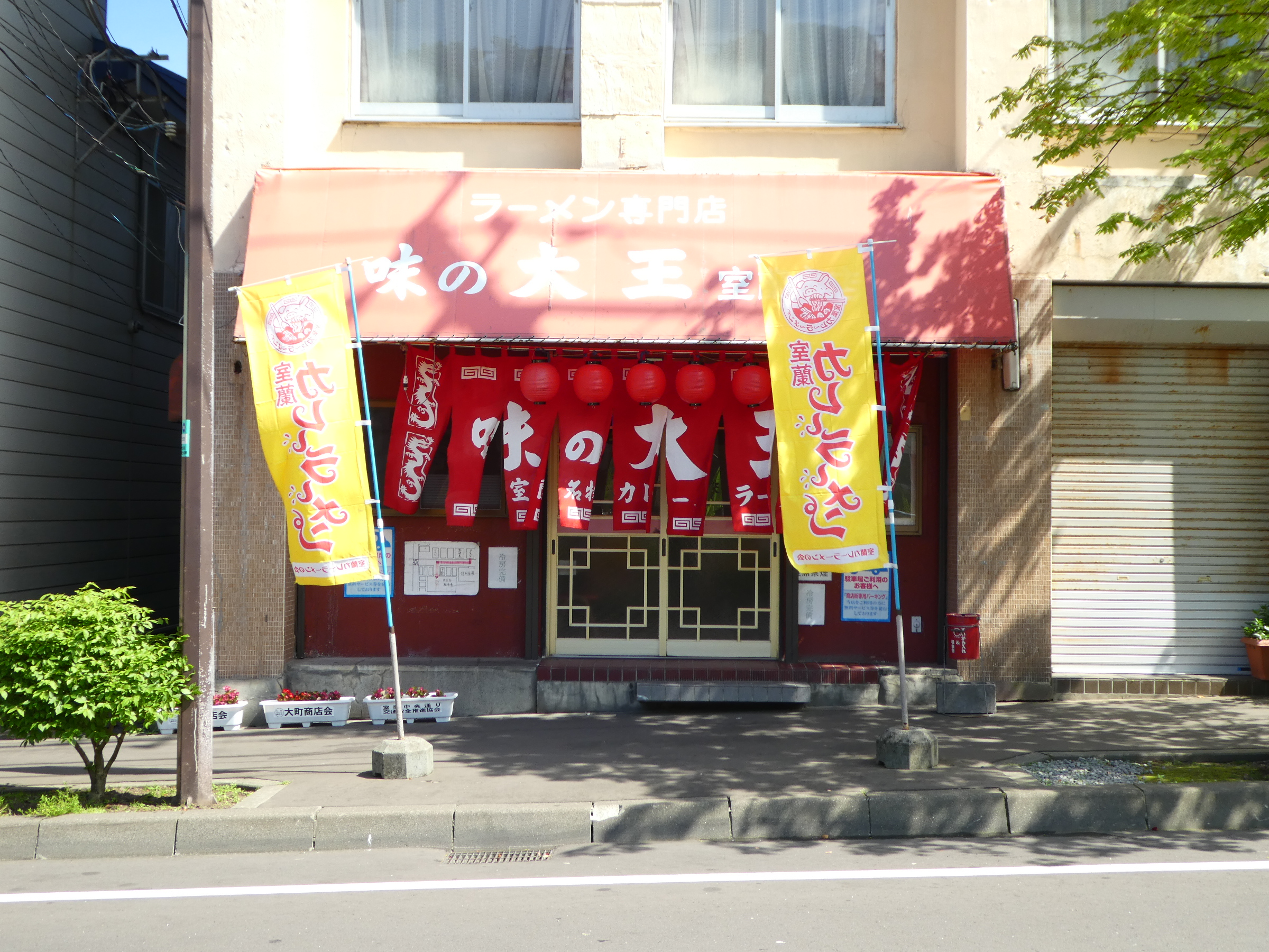 味の大王 室蘭本店